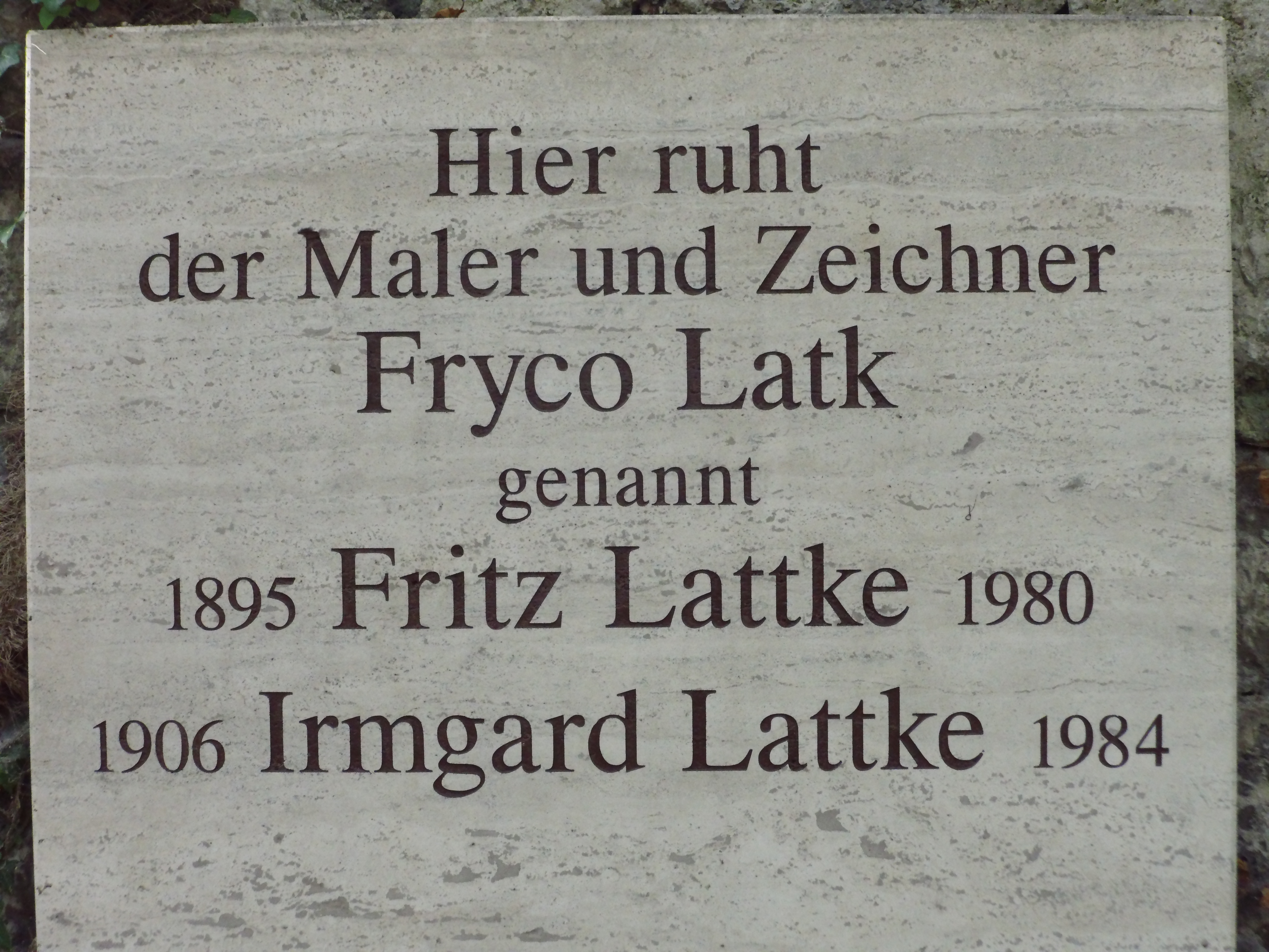 Erinnerungstafel an Fryco Latk und dessen Frau am langjährigen Wohnhaus in Weimar